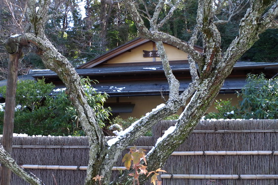 東慶寺の寒雲亭（茶室）。